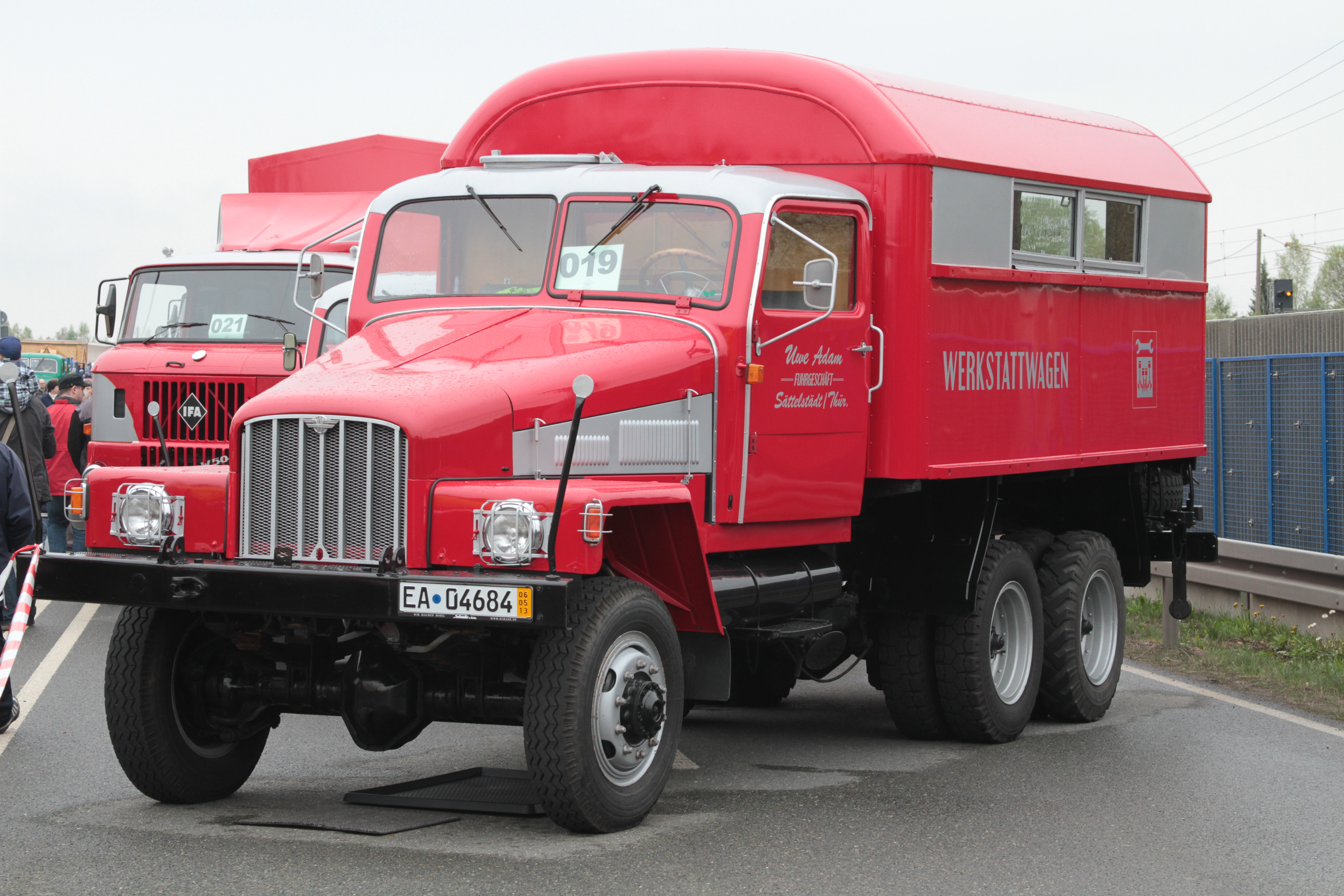 16. IFA Oldtimertreffen Werdau 2013, Germany